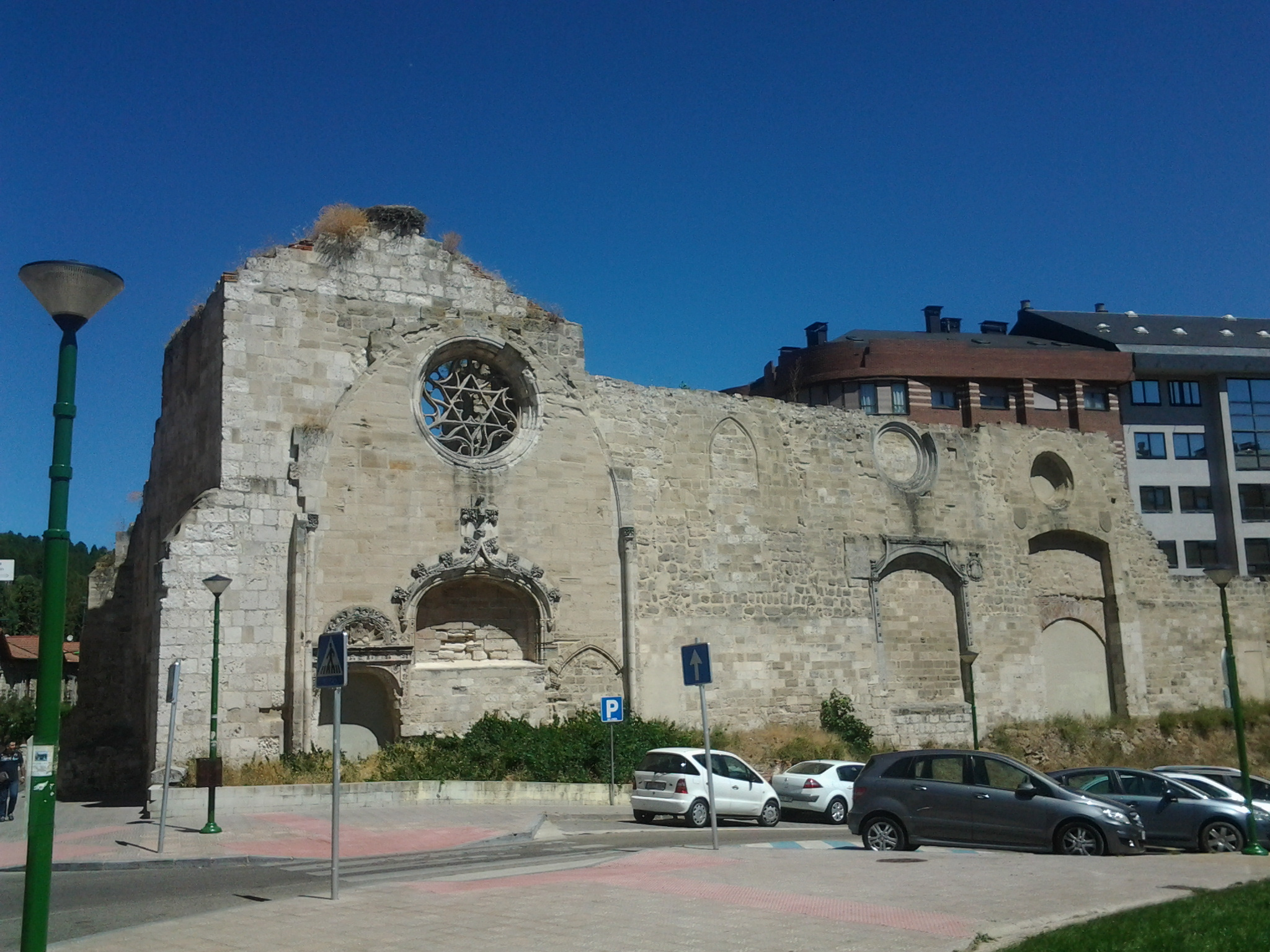 Ruinas del monasterio de San Francisco de Burgos, provincia de Burgos, (España).